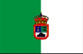 Bandera de Buenavista del Norte, en la provincia de Santa Cruz de Tenerife (España)